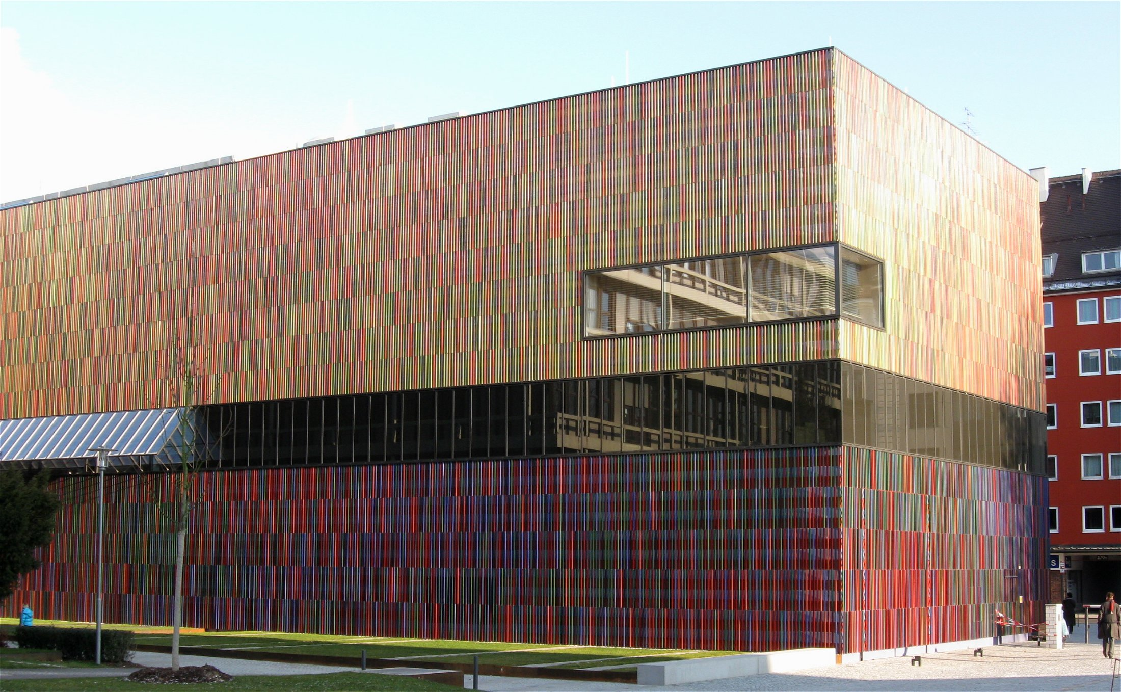 Museum Brandhorst, Muenchen, kurz vor der Eröffnung